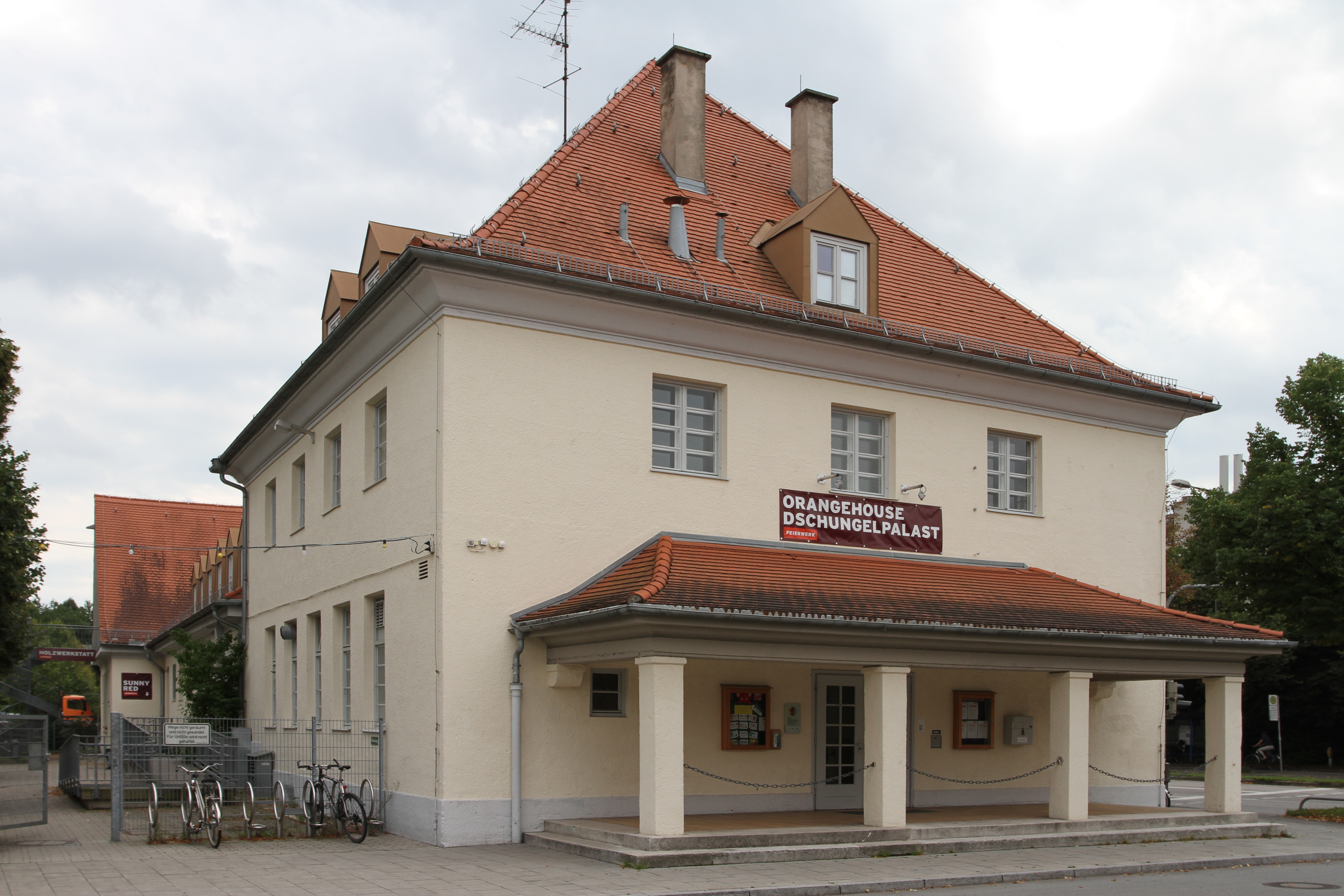 Feierwerk, Hansastraße 41, München ehemaliges Betriebsgebäude der Firma Leonard Moll, heute städtisches Kulturzentrum und Mehrgenerationenhaus